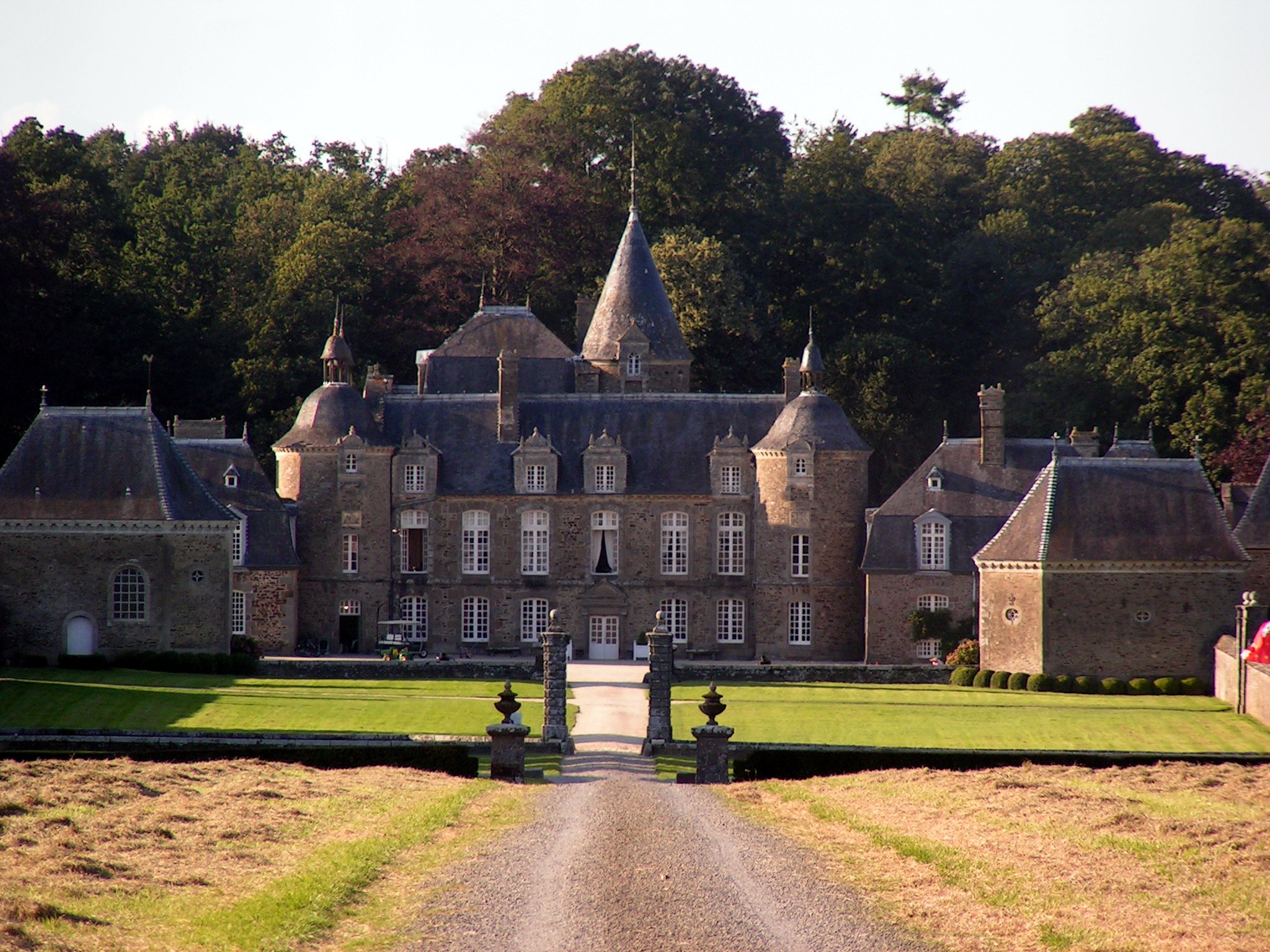 Château de la Bourbansais (façade sud)